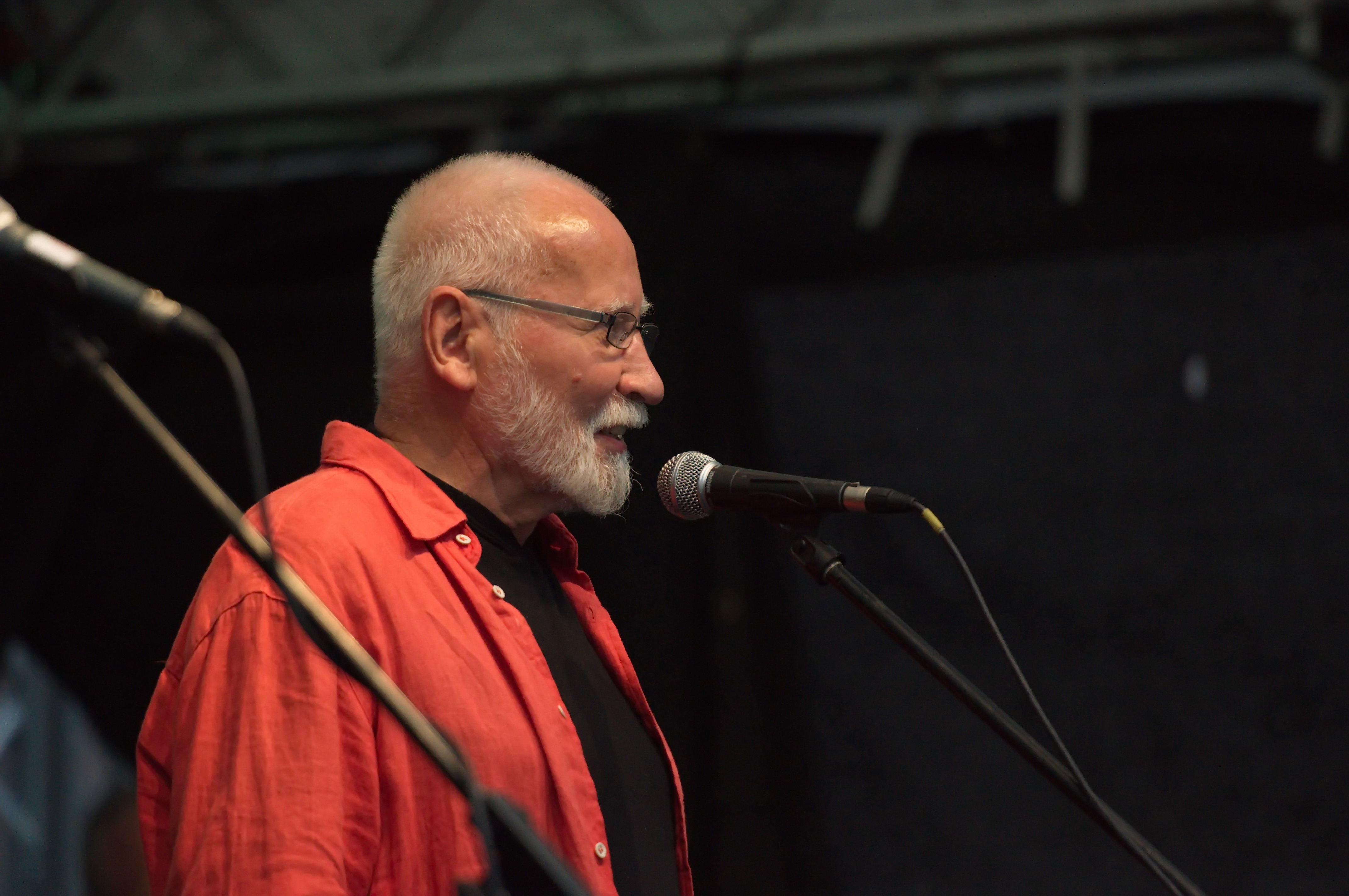 Open-Air-Konzert von Bassekou Kouyate & Ngoni ba; Tournee "Jama ko" im Skulpturenpark Waldfrieden, Wuppertal Ernst Dieter Fränzel